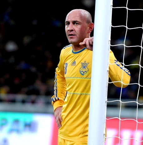 Сергей Назаренко во время матча Украина - Германия